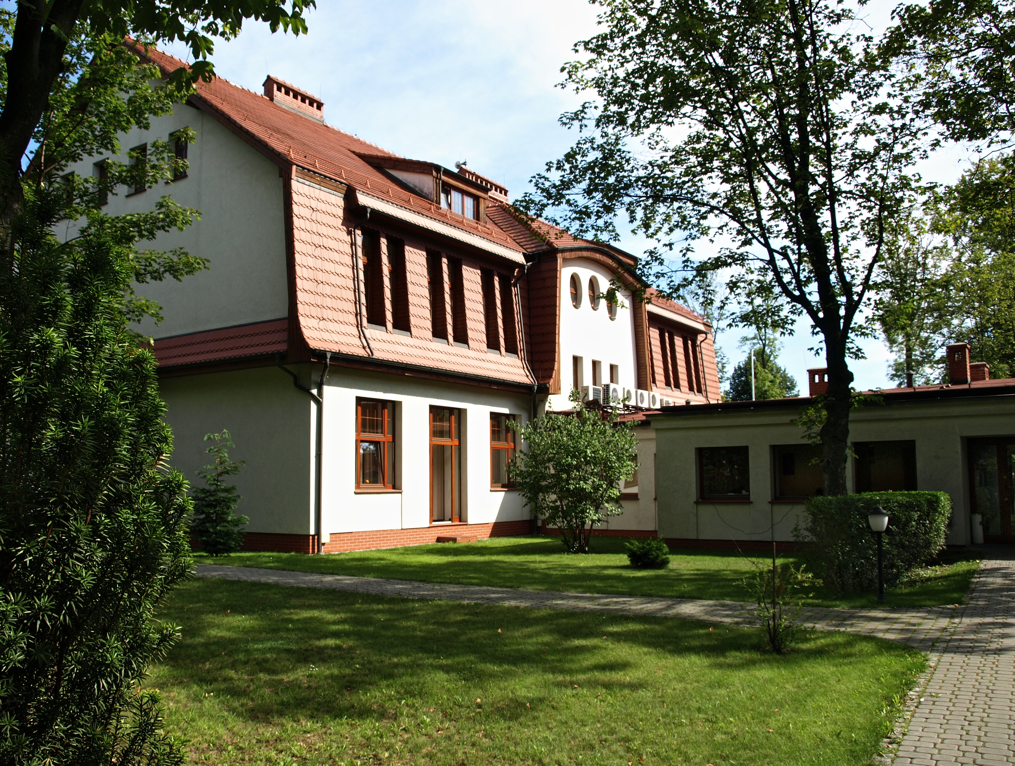 Budynek dawnej szkoły położony przy pl. pod Lipami w Katowicach, w dzielnicy Giszowiec, budynek wzniesiono w latach 1907-1914.